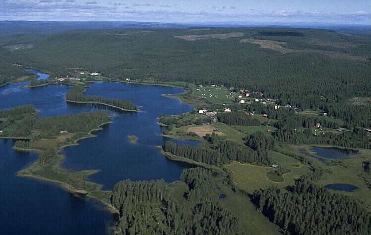 Ammerån Motiv: Skyttmon Nyckelord: Flygbilder, Riksintressen Kategori: Insjömiljöer Ammerån.